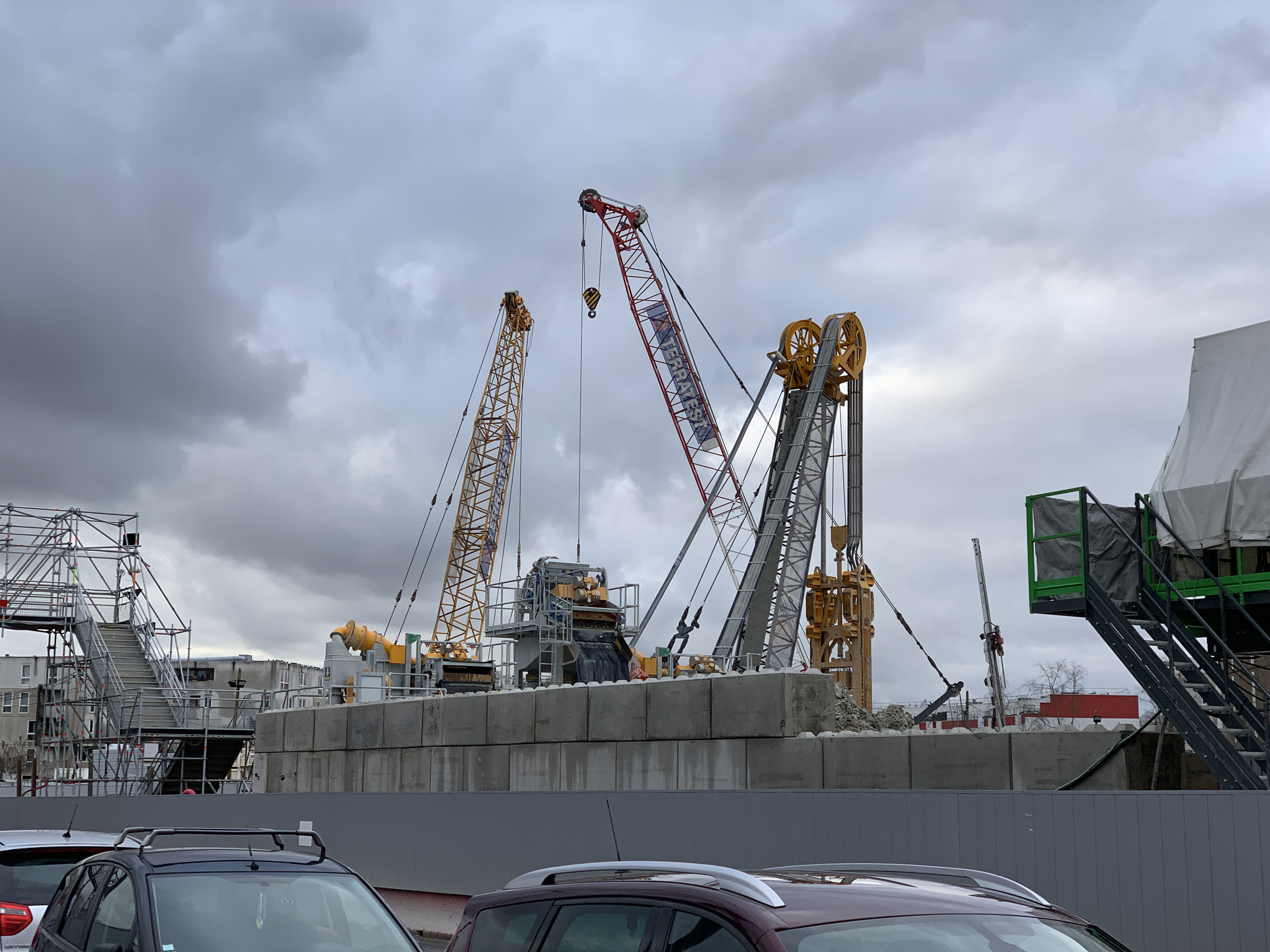 Chantier de la station de métro Sevran - Beaudottes, Sevran.